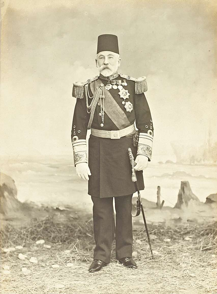 Amiral Woods Paşa